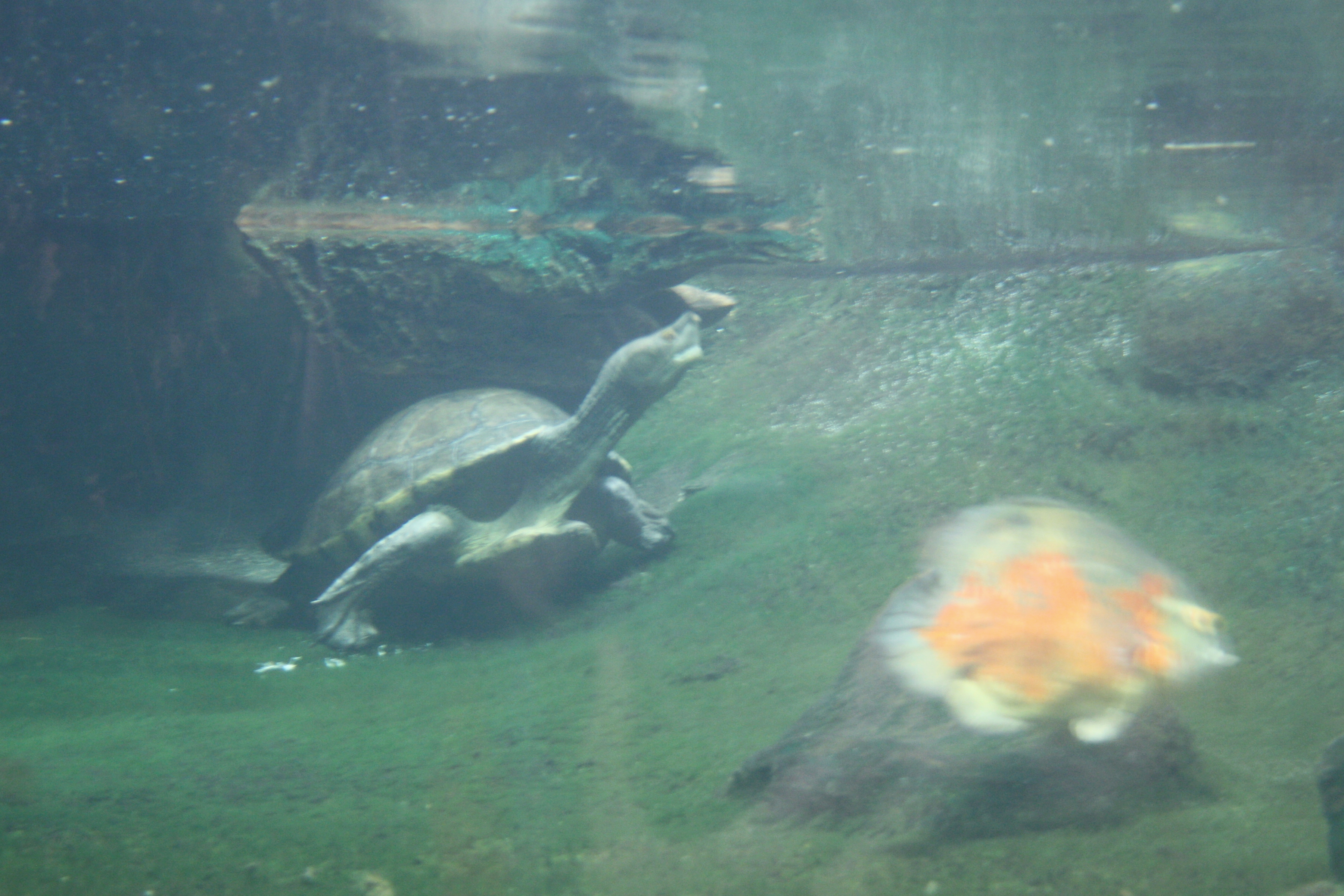 Zoo Praha